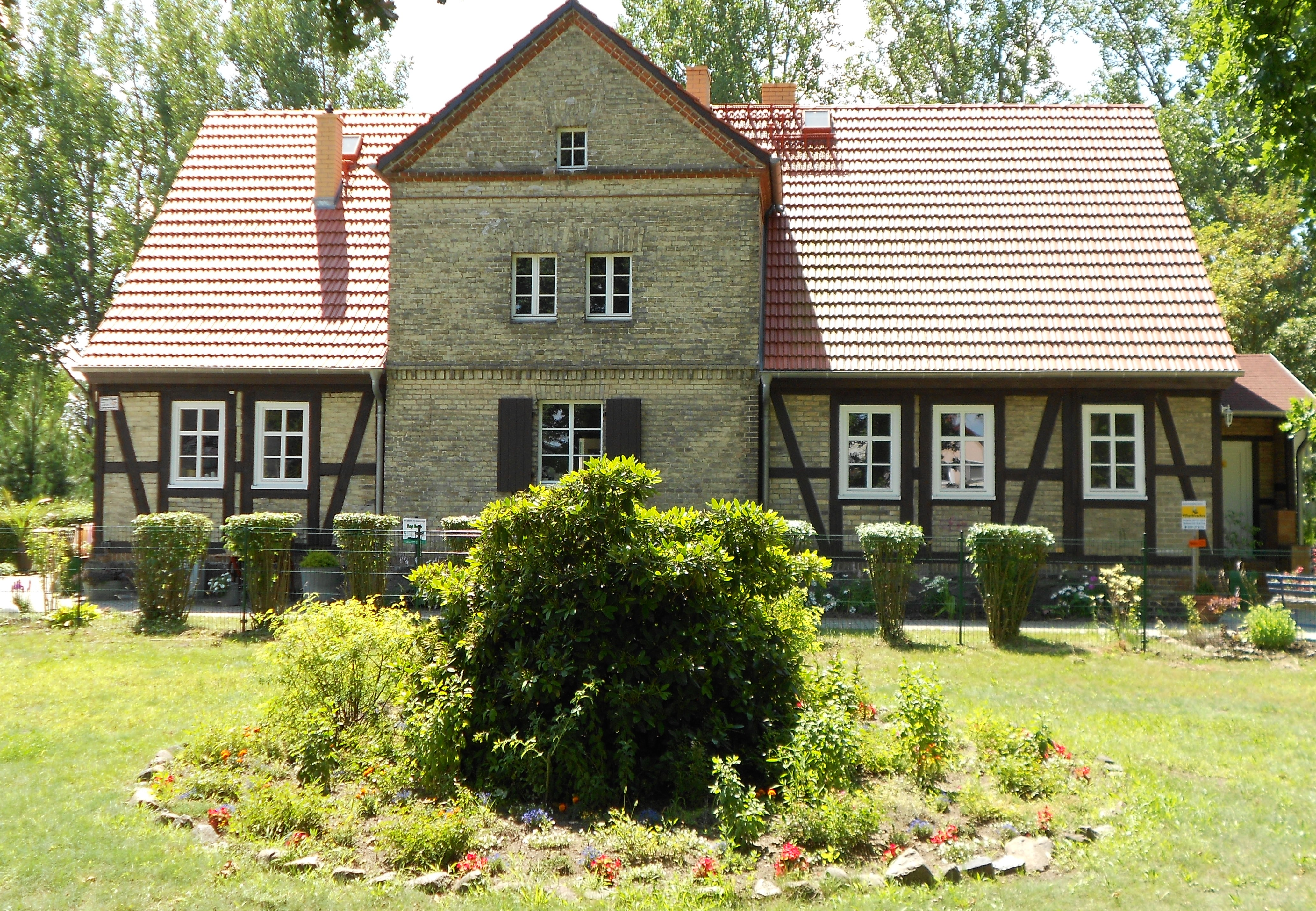 Alte Darre in Schmachtenhagen